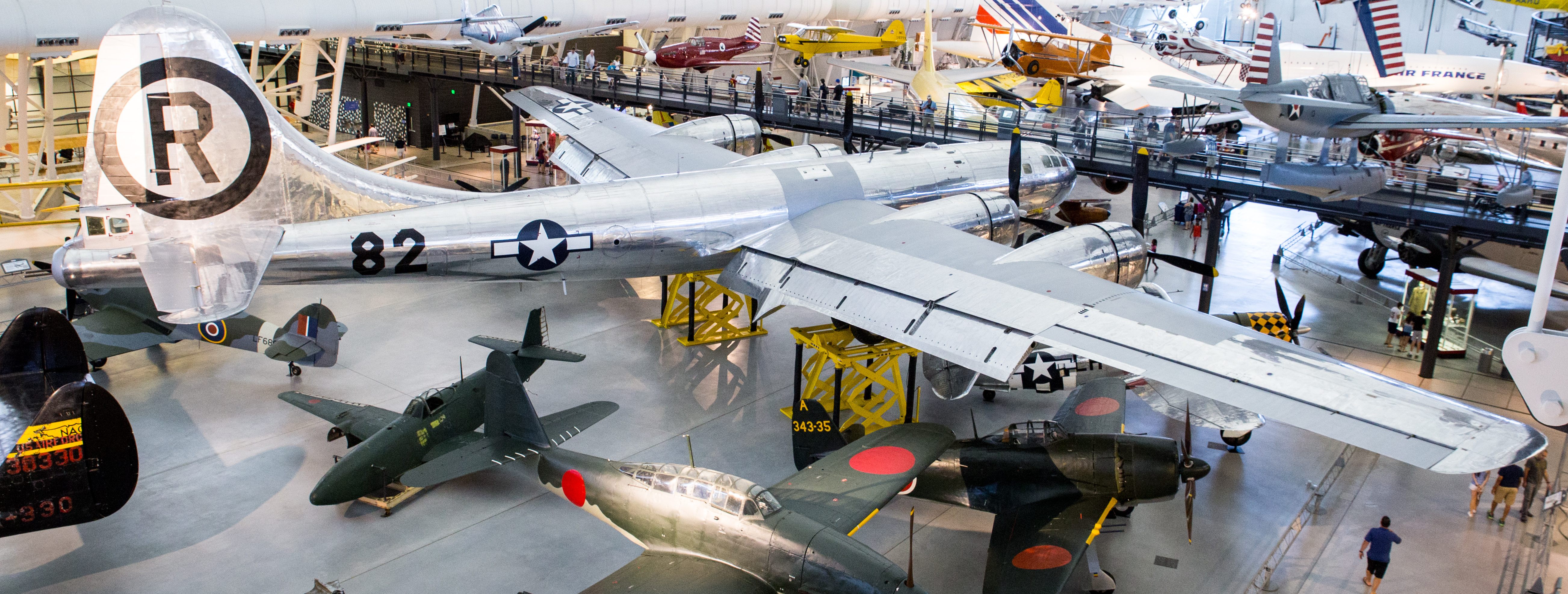 Le bombardier Enola Gay exposé au National Air and Space Museum.